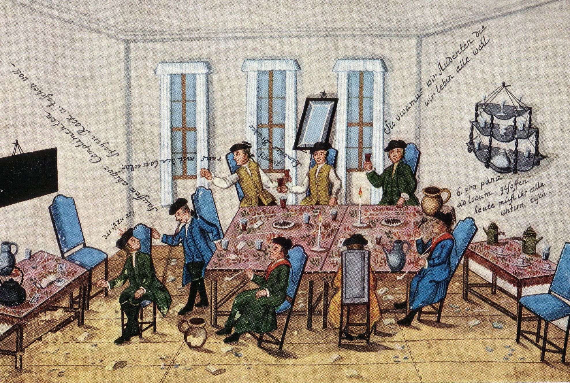 Blatt aus dem Stammbuch von stud. iur. Johann Christoph Schubert aus dem Bayreuthischen